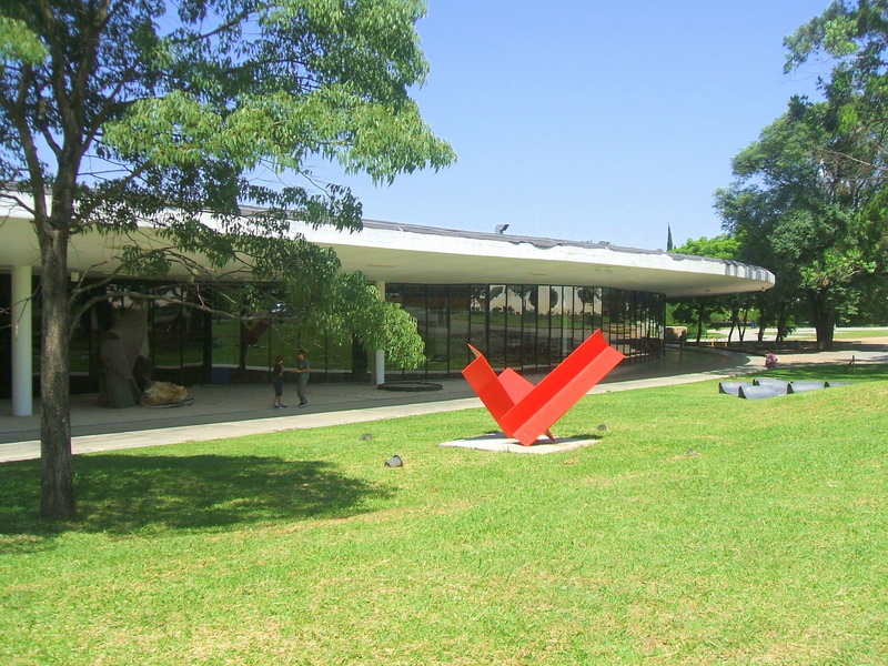 Fachada do Museu de Arte Moderna de São Paulo